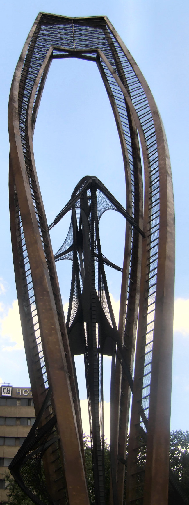 Gestileerde bloem van Naum Gabo voor de Bijenkorf in Rotterdam